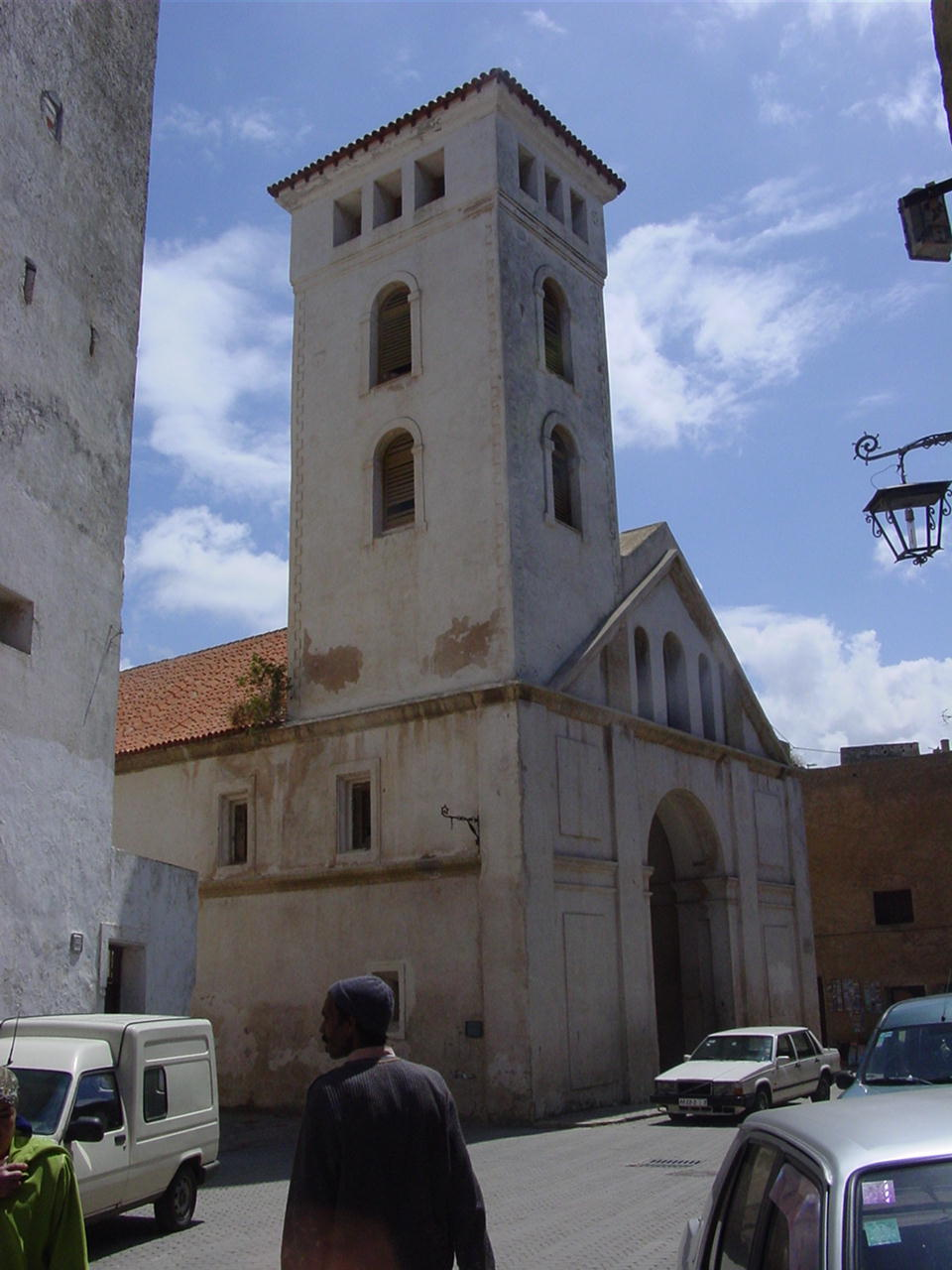 Al Jadid (Marzagão). Cidade de Marzagão fundada pelos portugueses em 1513 no sítio de uma fortaleza Almohad. Abandonada pelos portugueses em 1769 na sequência de um cerco do sultão Sidi Mohamed ben Abdallah. Igreja da Assunção